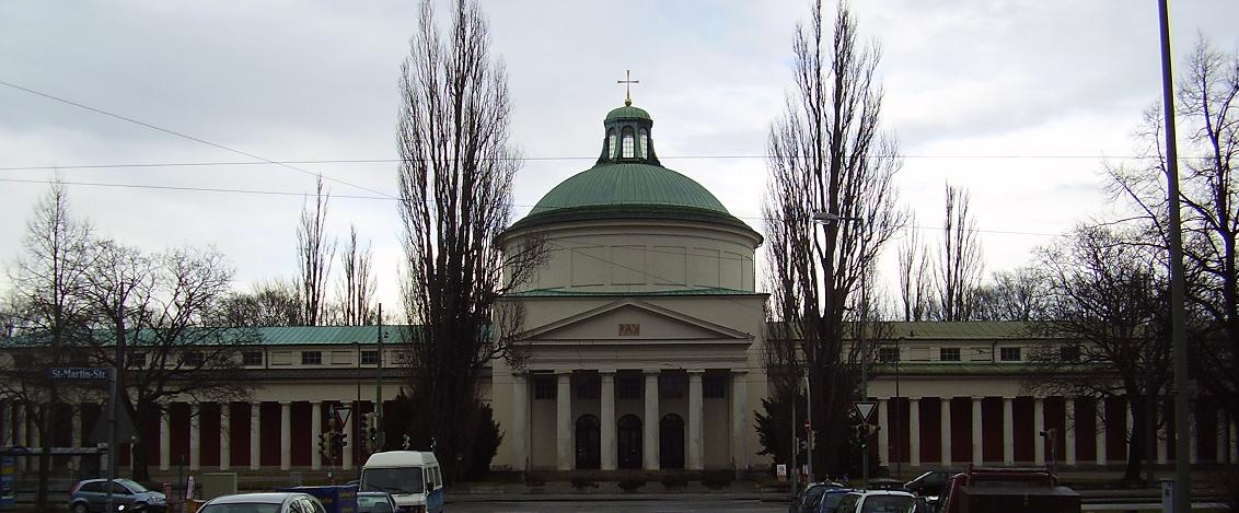 Ostfriedhof (Munich / Germany)